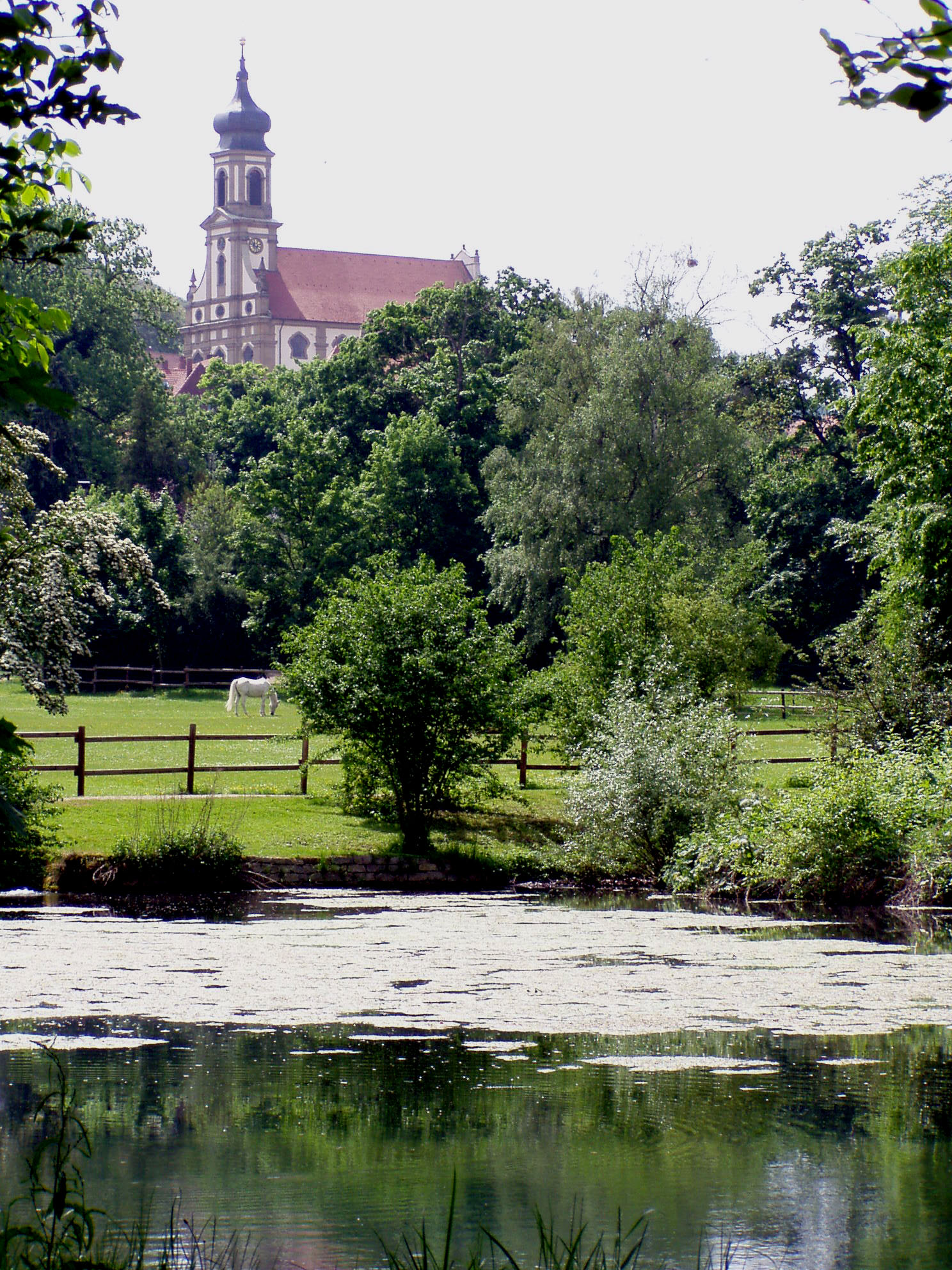 Grafschaftskirche von Castell